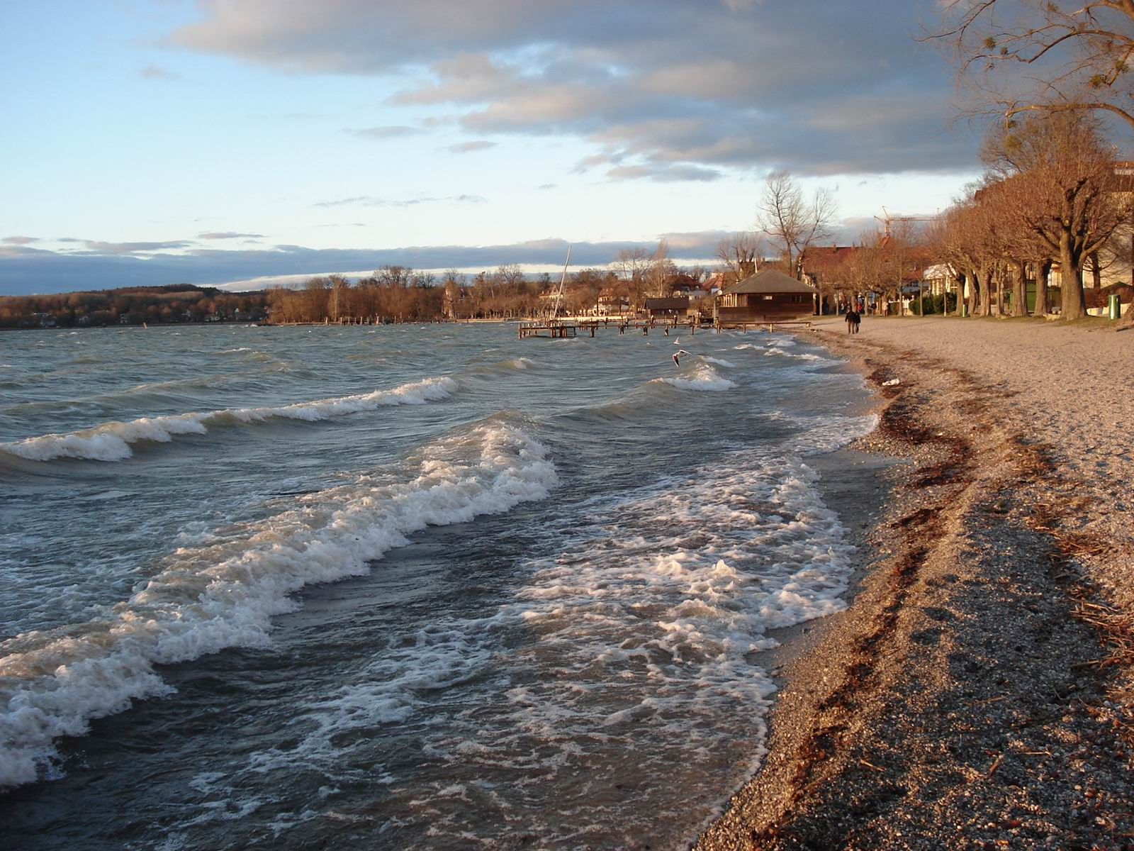 Die Herrschinger Bucht im Winter